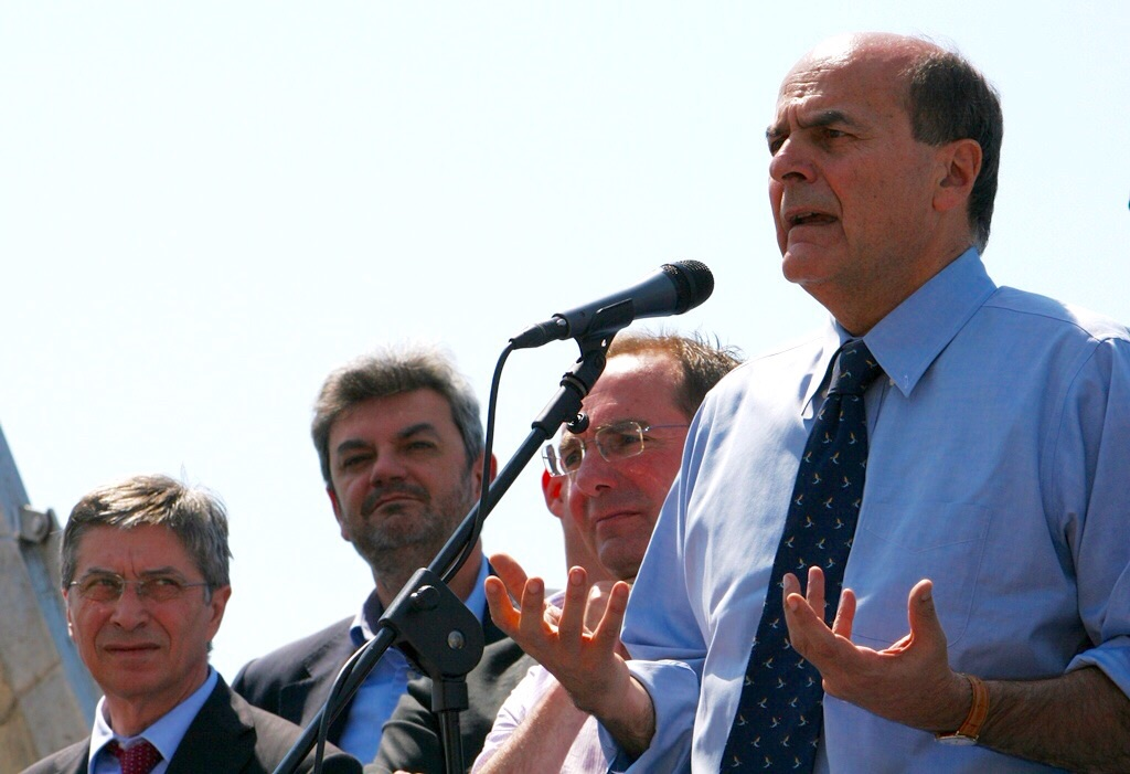 Cesenatico. Da sinistra: Vasco Errani, Damiano Zoffoli, Nivardo Panzavolta e Pier Luigi Bersani